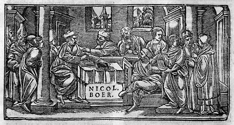 Boerius beim Disputieren im Gerichtssaal.; Illustration aus Nicolaus Boerius (Nicolas de Bohier, 1469-1539): Decisionum aurearum, in sacro burdegalens senatu olim discussarum ac promulgatarum. Lyon, Antoine Vincent, 1551. Der Autor war Präsident des Parlements von Bordeaux.